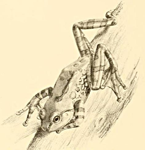 Rhacophorus variabilis